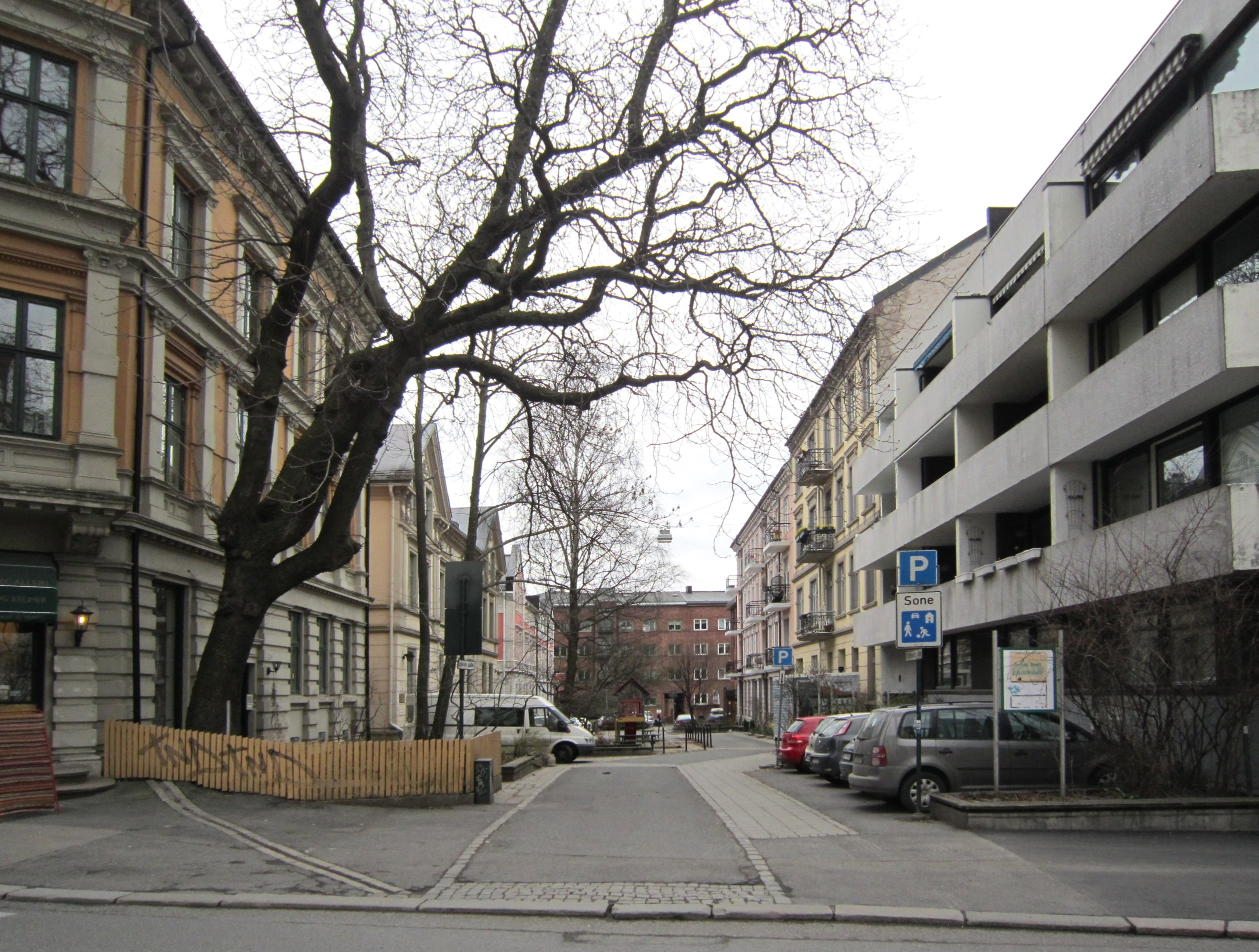 Dybwads gate på Majorstuen i Oslo